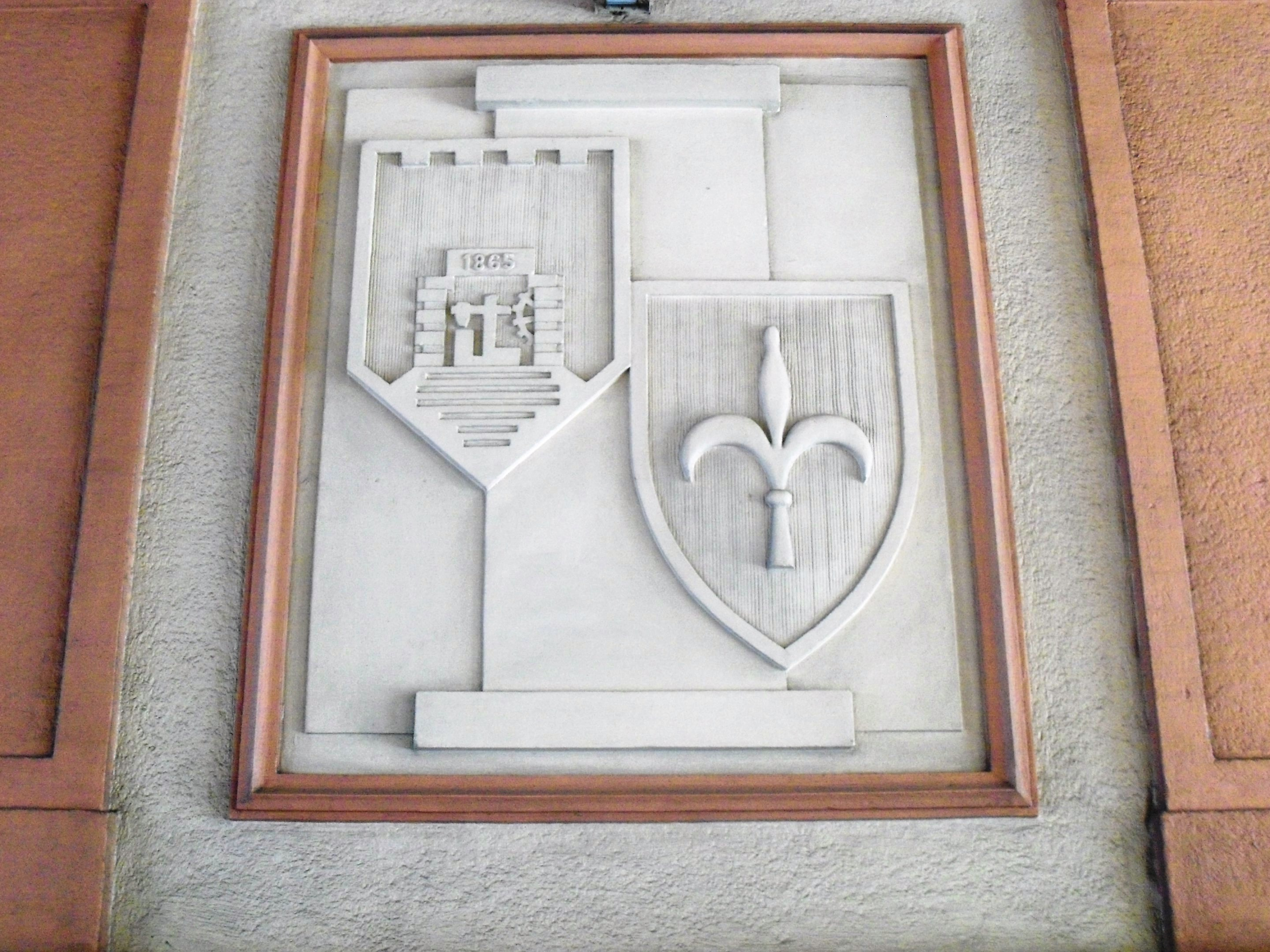 Budynek przy ul. 3 Maja 23 w Katowicach - rzeźba we wnętrzu - brama wjazdowa